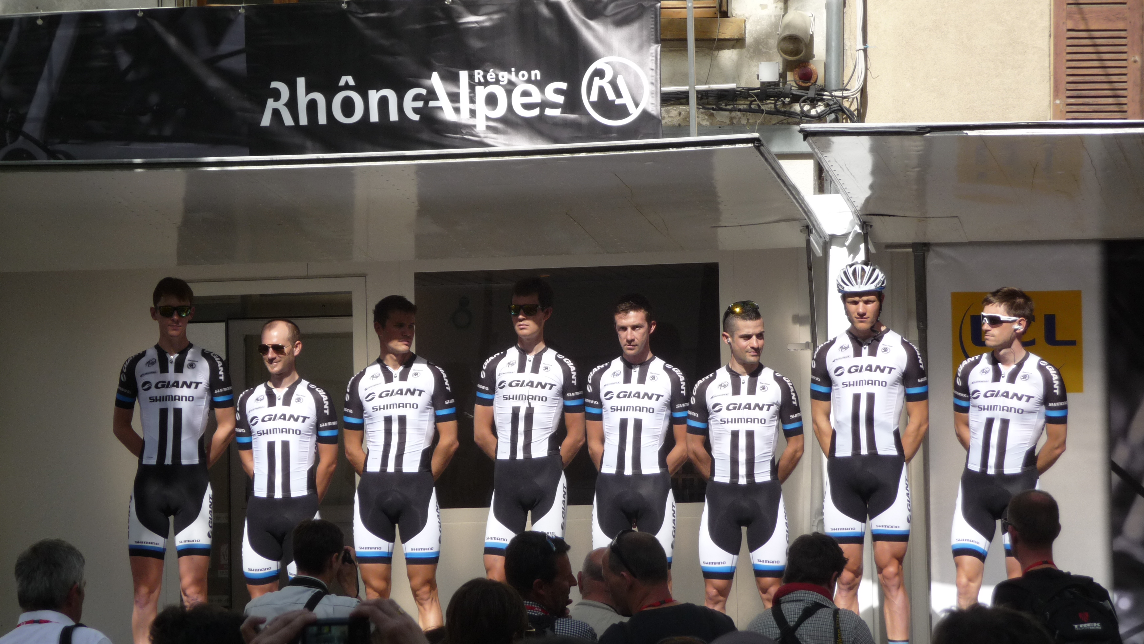 Présentation des équipes du Critérium du Dauphiné 2014 lors du départ de la 2ème étape à Tarare.